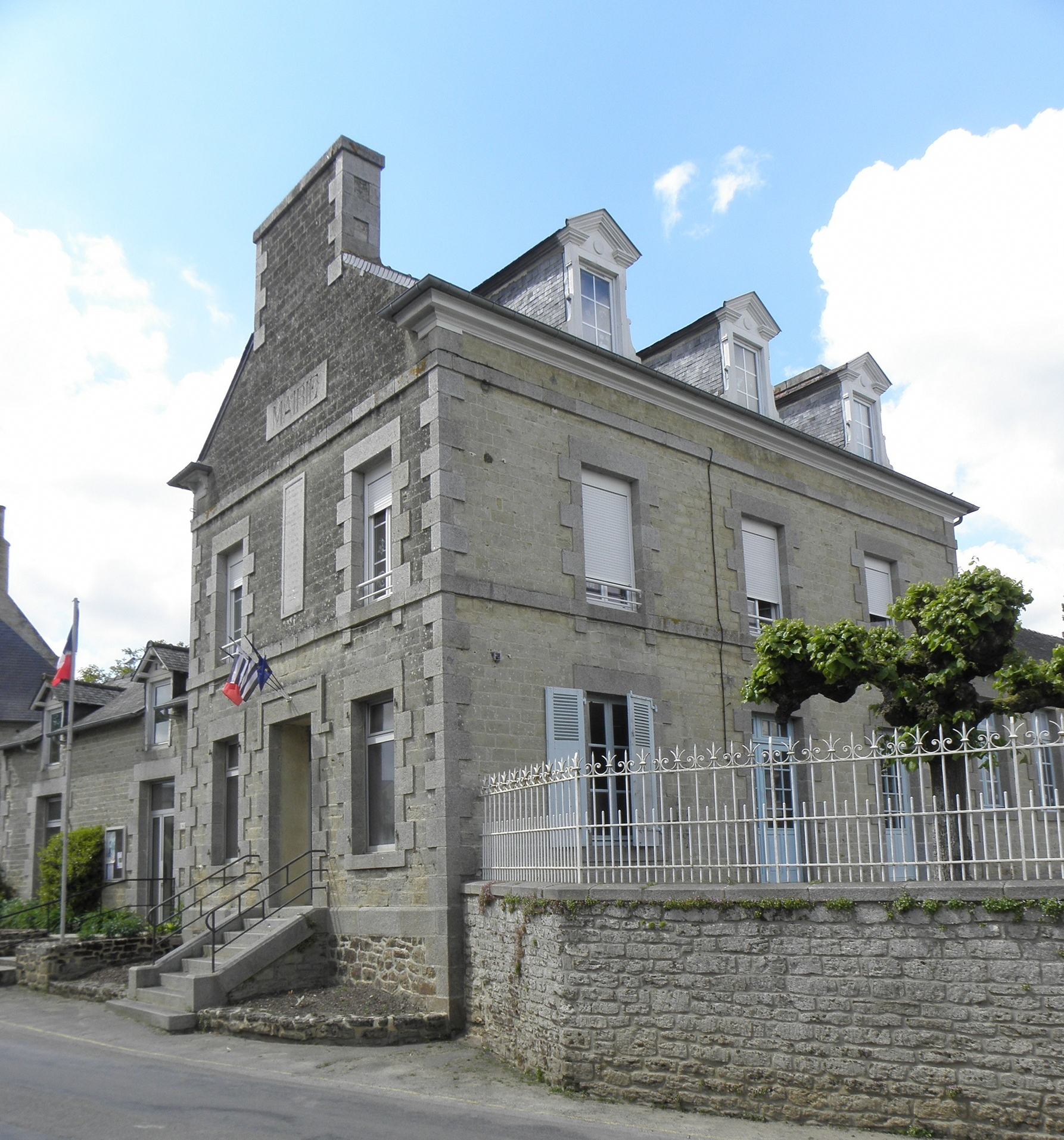 Mairie-École de Saint-JUvat (22). .